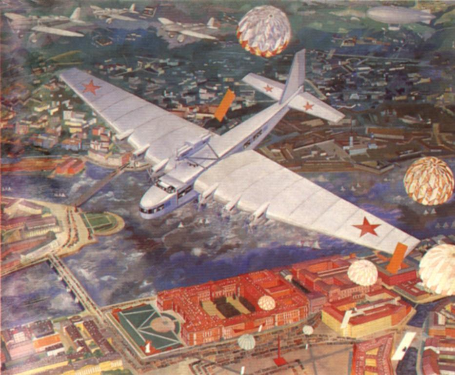 Wassili Kupzow: ANT 20 "Maxim Gorki", 1934, St. Petersburg Wassili Wassilewitsch Kupzow, (Василий Васильевич Купцов) * 1899 in Pskow; † 1935 in Leningrad ([1], [2])